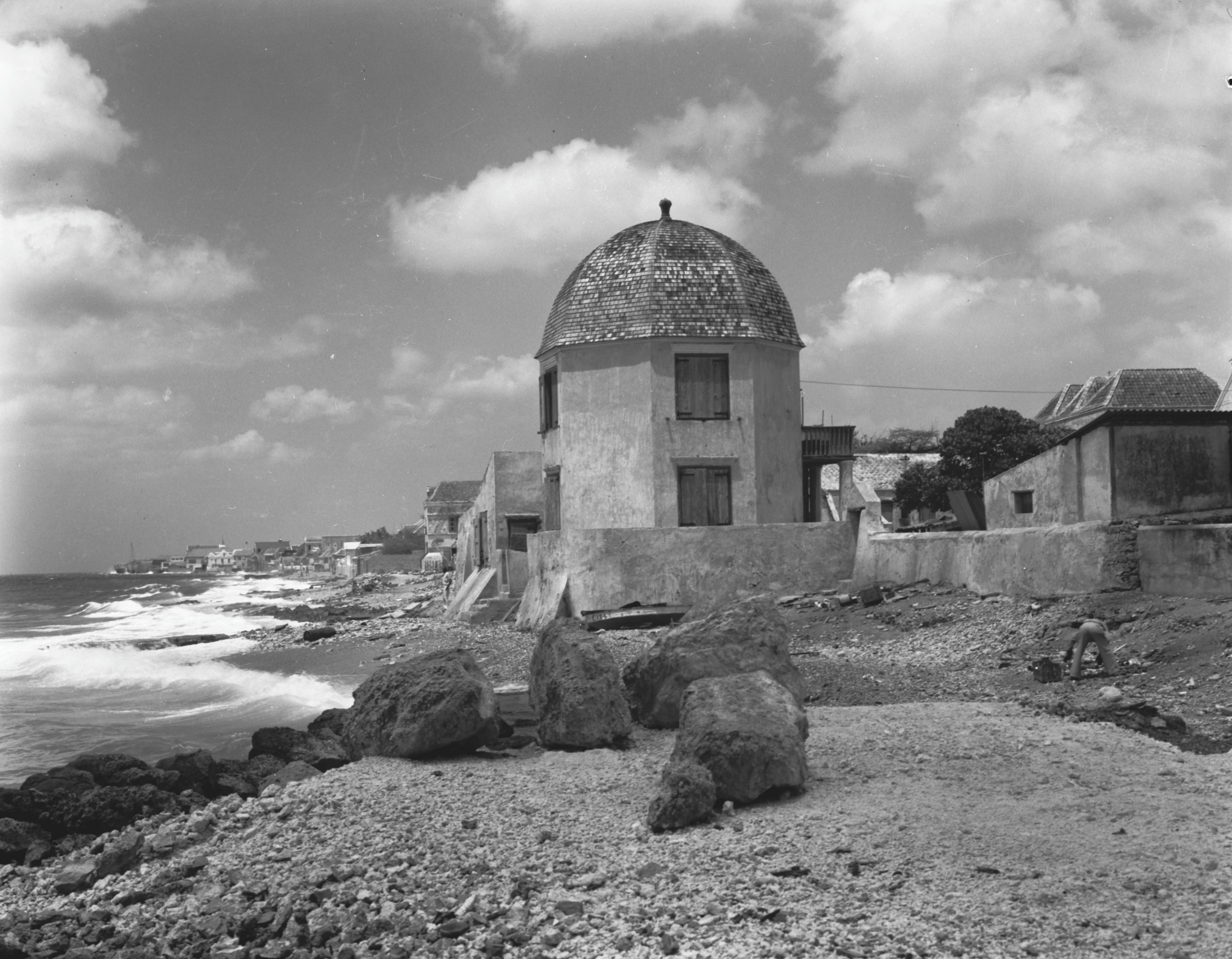 Koepel Simon Bolivar, zeezijde Onderwerp: koepels, Kust